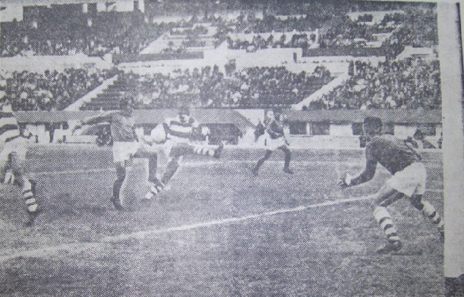 River Plate scoring a goal against Deportivo Morón in 1969.